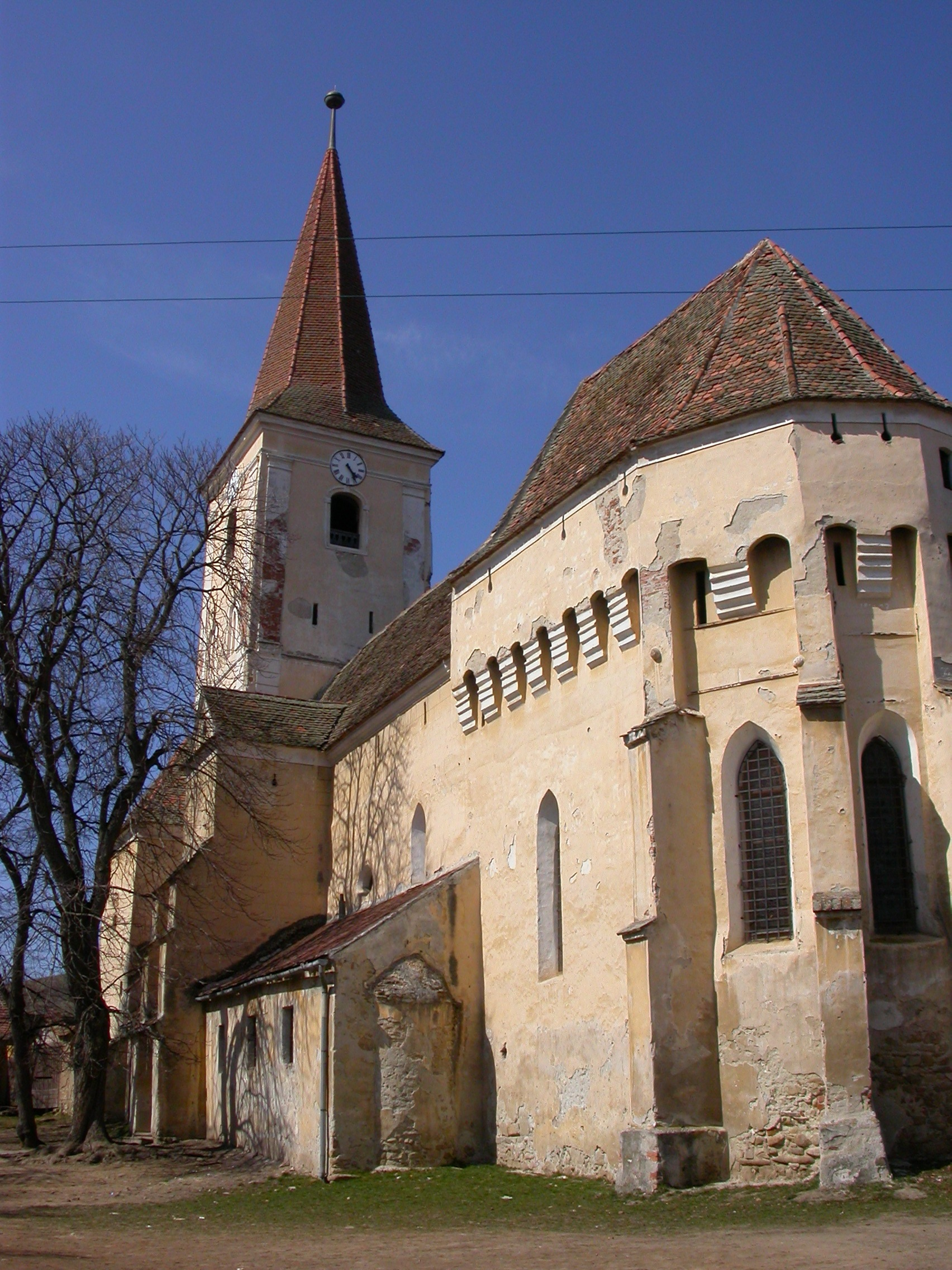 Ansamblul bisericii evanghelice, prima jum. a sec. XIII - sec. XIX